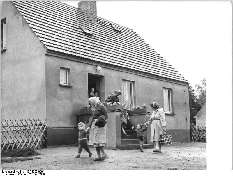 Priborn, Kinderkrippe, Verabschiedung Zentralbild Krisch Me. 20.5.60 Zum Internationalen Kindertag Dorfkinderkrippe in Priborn Die LPG Priborn, Kreis Pöbel, richtete für die jüngsten Dorfbewohner eine vorbildliche Kinderkrippe ein. 20 Kinder bis zu drei Jahren finden hier Aufnahme und werden von drei Pflegerinnen betreut. UBz: Ist die Arbeit auf dem Felde oder im Stall getan, werden die Kleinen von ihren Muttis abgeholt.